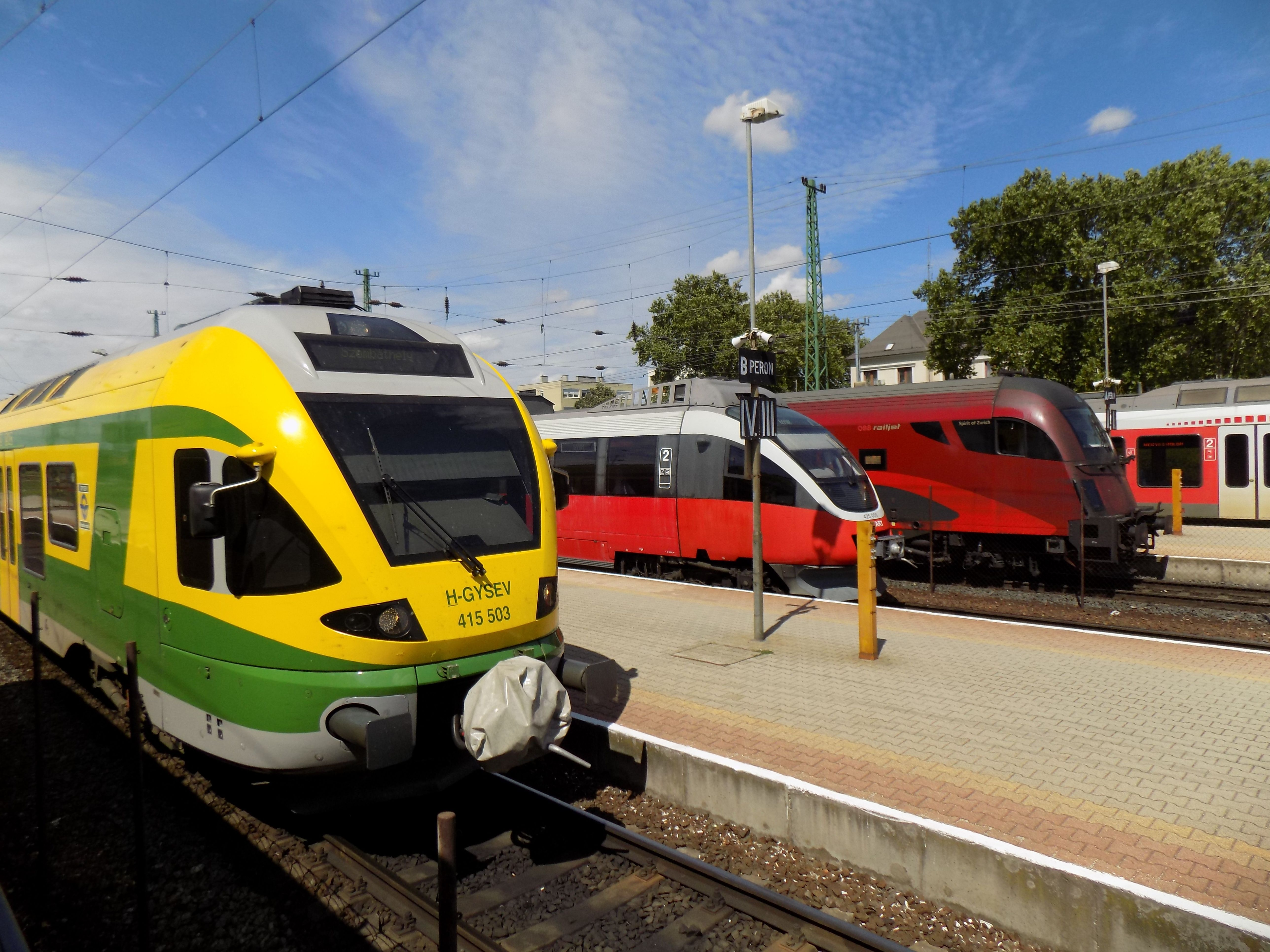 GYSEV Siemens FLIRT, MÁV Siemens FLIRT és Bombardier Talent, illetve ÖBB railjet vonatok Hegyeshalom vasútállomáson